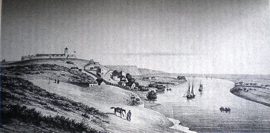 Vista panorámica de Carmen de Patagones (Argentina). Dibujo de 1829.